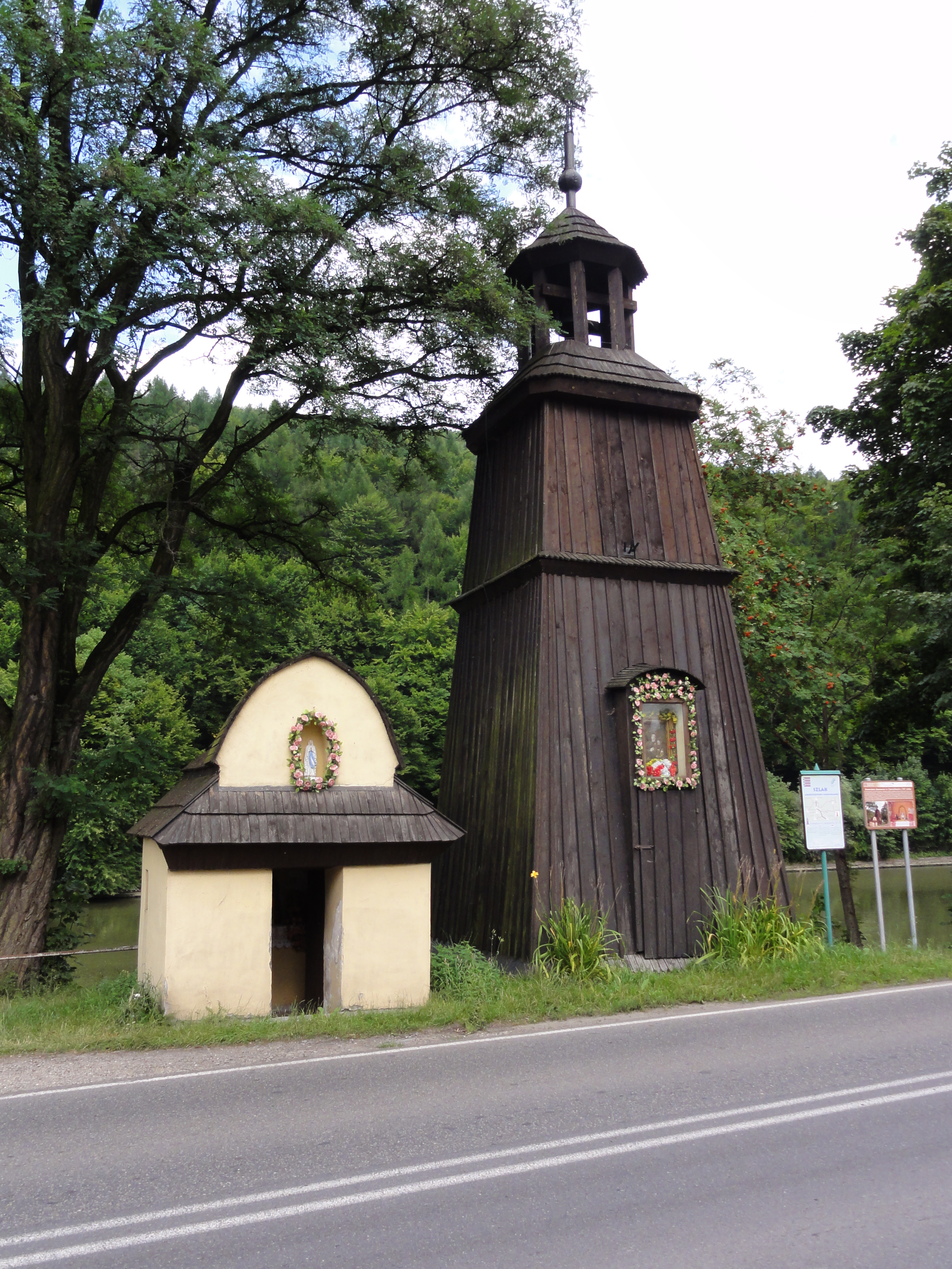 Kaplica murowana i dzwonnica drewniana w Czernichowie